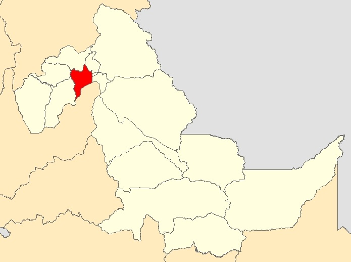 Mapa distrito Campoverde,Ucayali - Perú